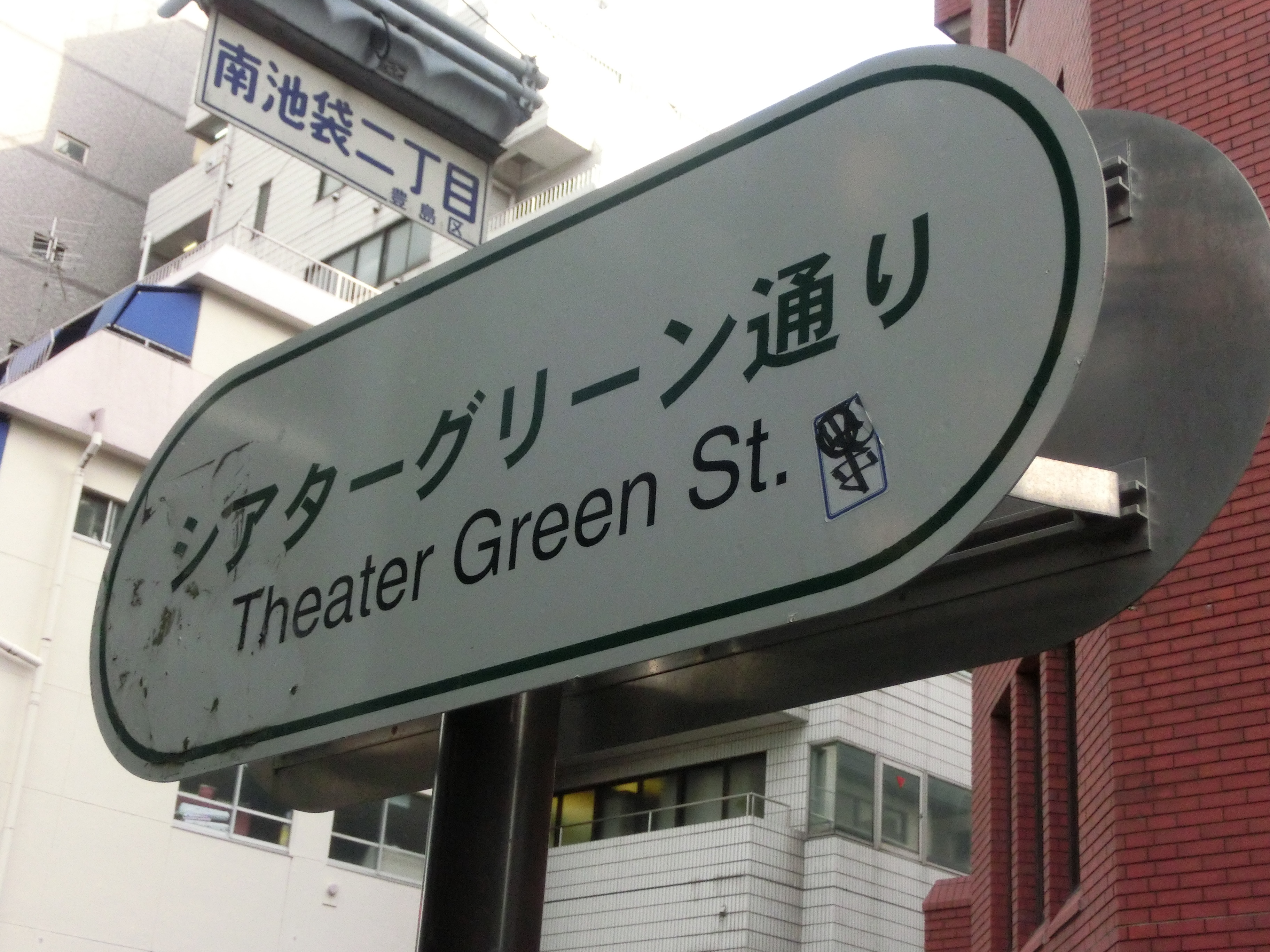 Theater green street